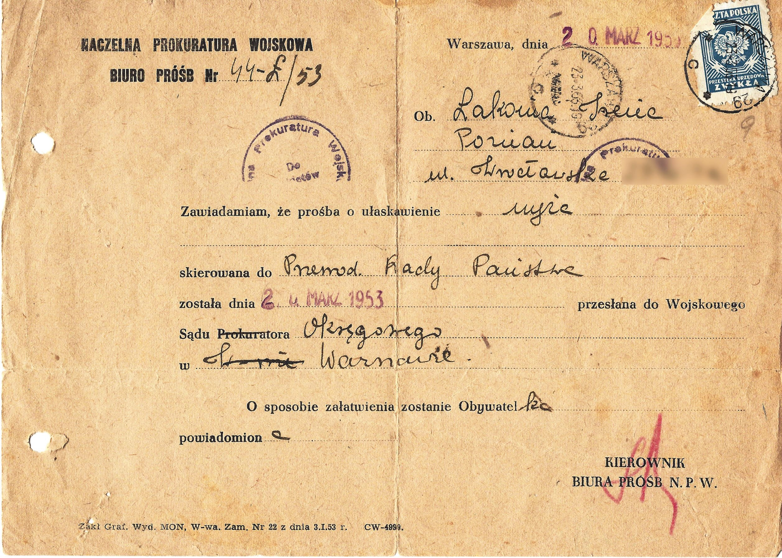 Pismo Naczelnej Prokuratury Wojskowej o skierowaniu wniosku o ułaskawienie do Przewodniczącego Rady Państwa